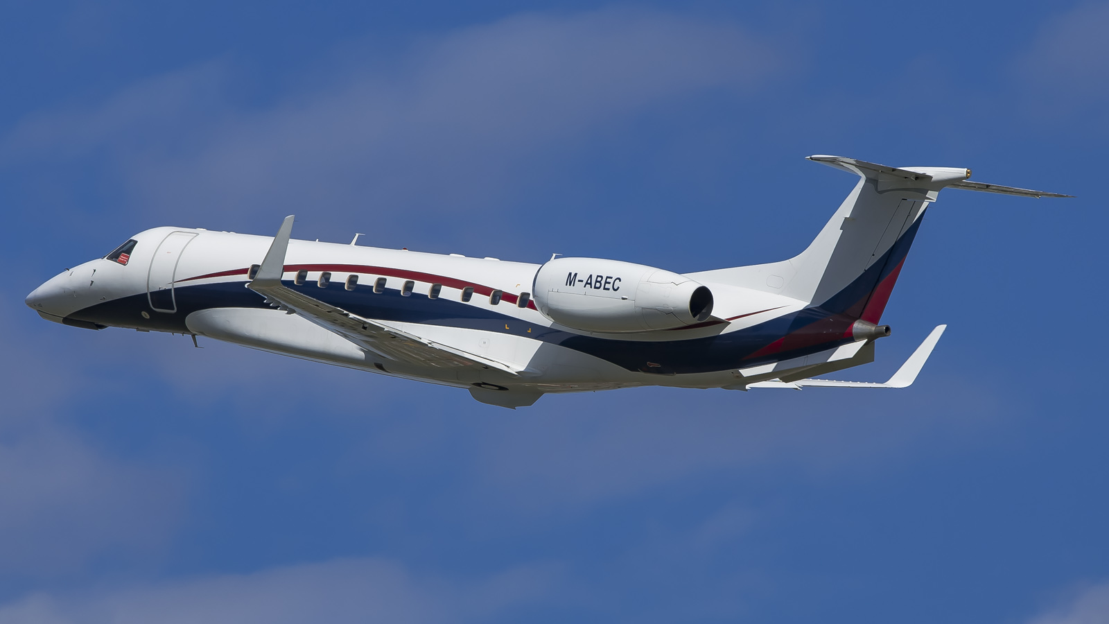 M-ABEC Embraer 135BJ Legacy Jet Capital VKO | UUWW